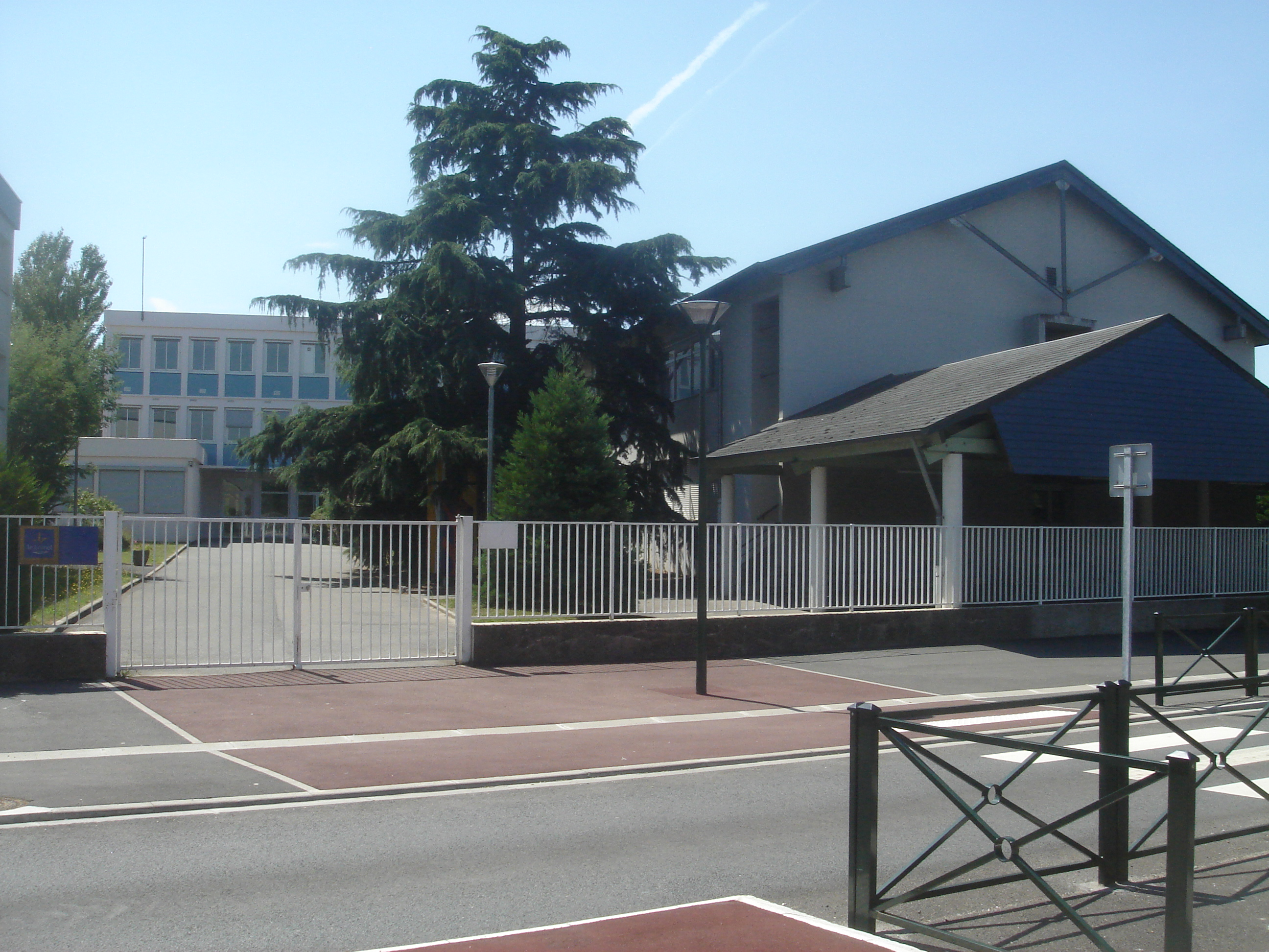 Collège le Clos-Ferbois, Jargeau, Loiret, France